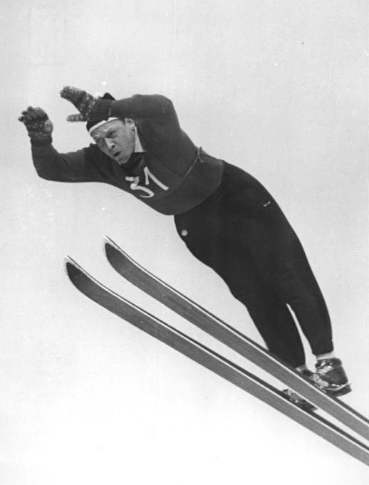 Zentralbild Wendorf-Wlocka 19.2.1956 VII. Wintersportmeisterschaften der DDR in Oberhof Am 18.2.56 fand auf der Thüringenschanze in Oberhof das Ausscheidungsspringen für den Spezialsprunglauf statt. UBz: Werner Lesser II - Sc Motor Zella-Mehlis - beim Sprung.